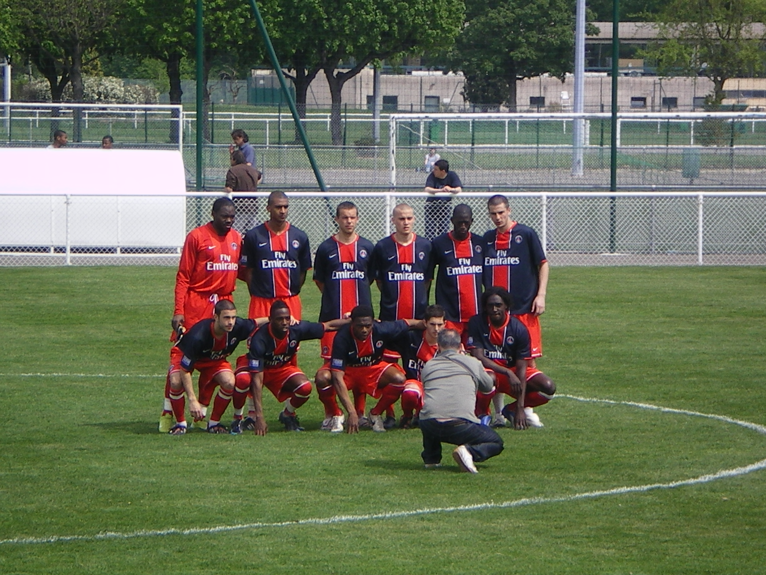 L'équipe réserve du PSG lors de la saison 2007-2008 de CFA avant d'affronter l'Aviron Bayonnais.